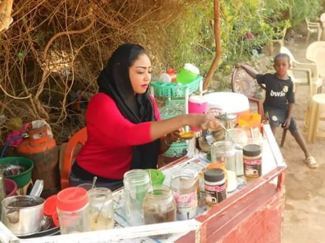 ست الشاي هكذا تسمى في السودان. هم نساء ذوات دخل محدود يقمن بعمل الشاي و القهوة في الاماكن العامة و الشوارع This is an image of "African people at work" from Sudan